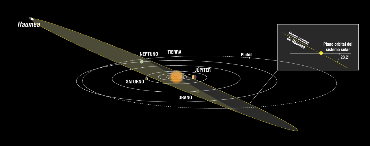 El quinto planeta enano del sistema solar, Haumea, y al menos uno de sus dos satélites, mantienen agua helada cristalina gracias a las fuerzas mareales entre ellos y al calor de elementos radiactivos. Así lo refleja un estudio internacional, con participación española, realizado con las observaciones del telescopio VLT del Observatorio Europeo Austral en Chile. Recorte 1(4)